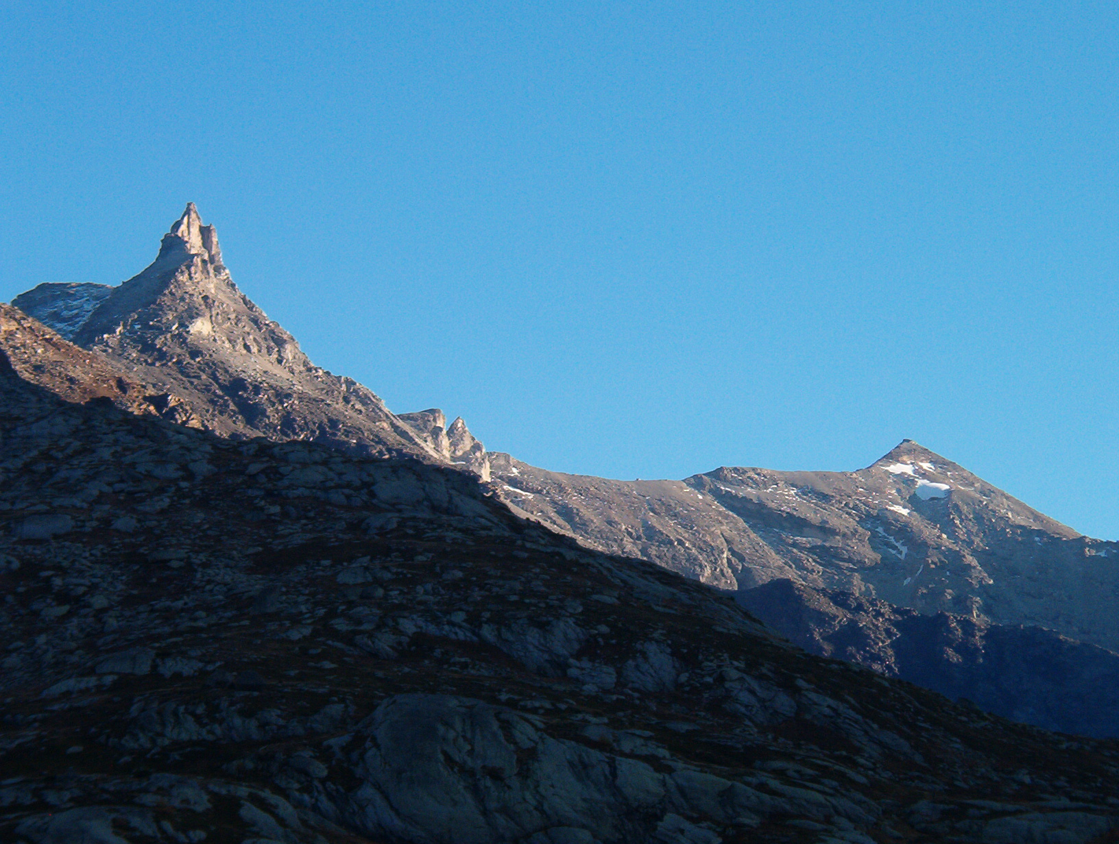 Rocca d'Ambin e Denti d'Ambin - Alpi Cozie - Italia - Francia